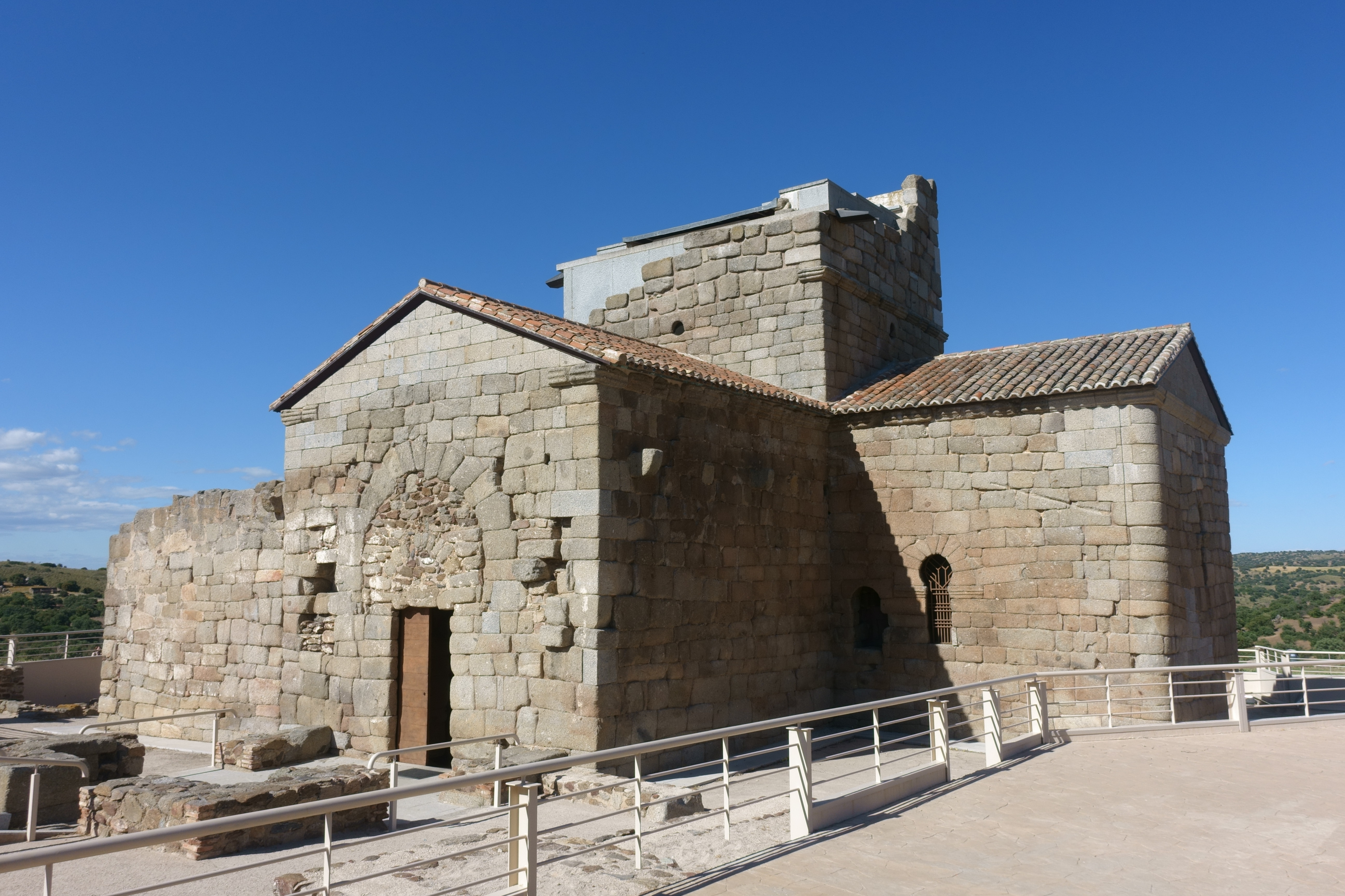 Exterior de la iglesia de Santa María de Melque, en San Martín de Montalbán (Toledo, España).